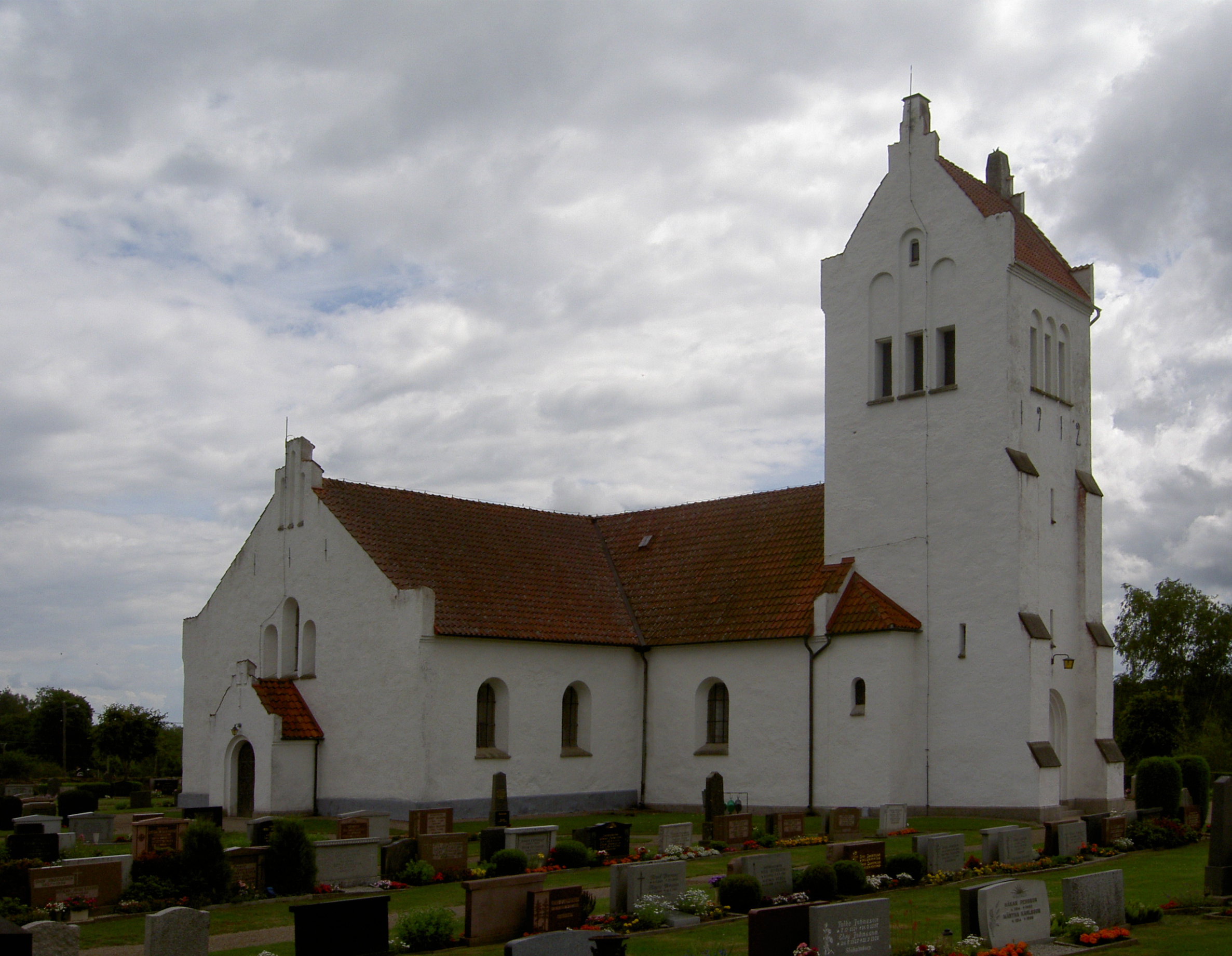 Verums kyrka